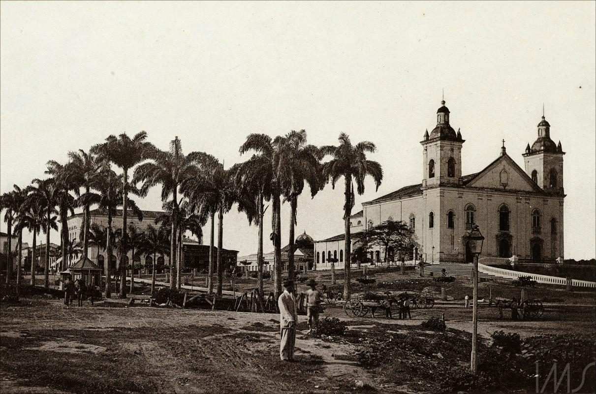 Catedral Metropolitana de Manaus, Brasil.